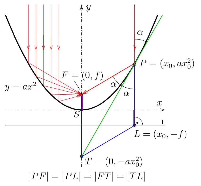 Parabel: Brennpunkt-Eigenschaft